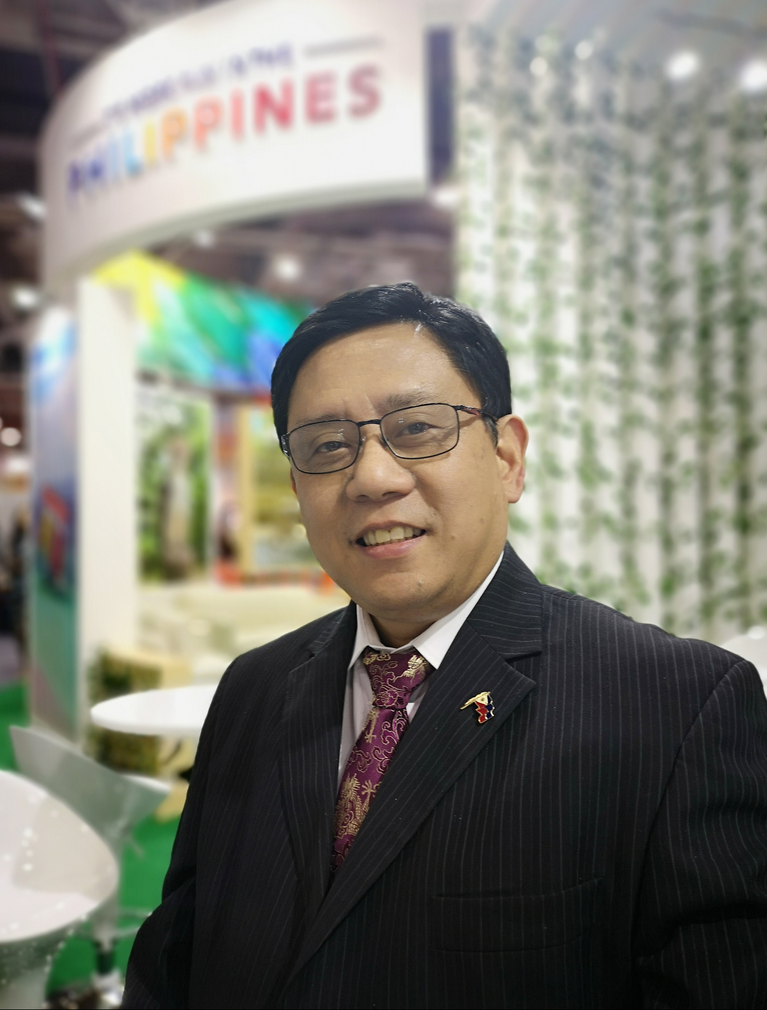 Noel Servigon, auf dem ASEAN Tourism Forum 2019 in Ha Long Bay, Viet Nam; organisiert von TTG Events, Singapore